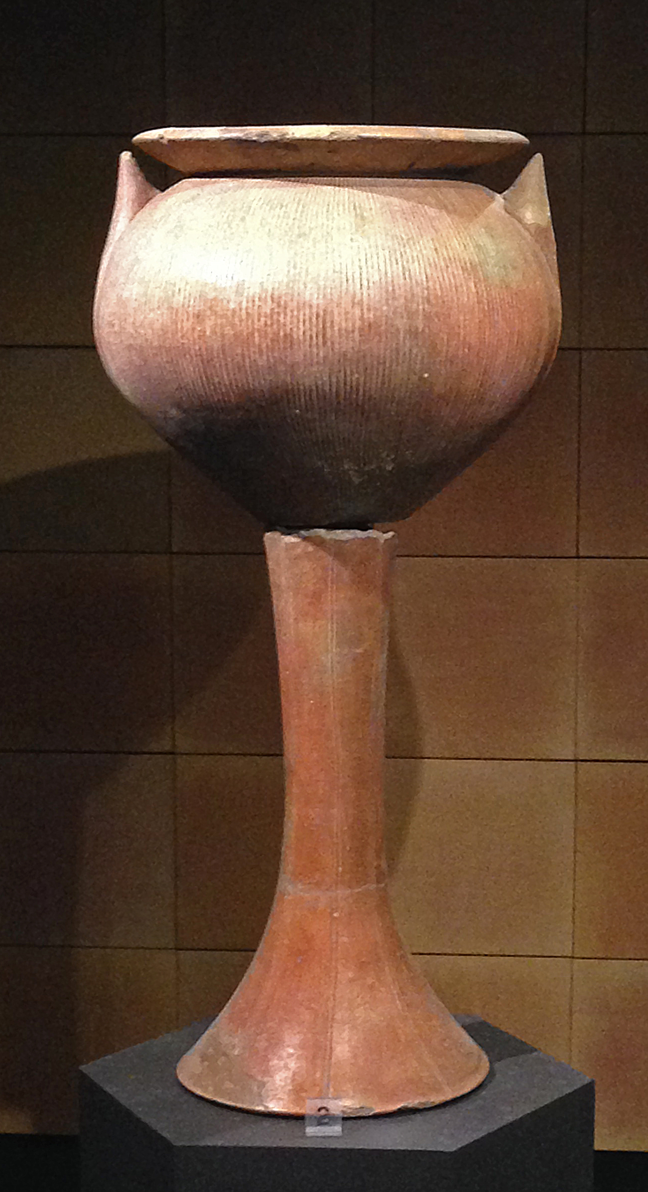 Olla globulare su piede. Necropoli nord ovest di Pantalica. Fase di Pantalica I 1250-1050 a.C.